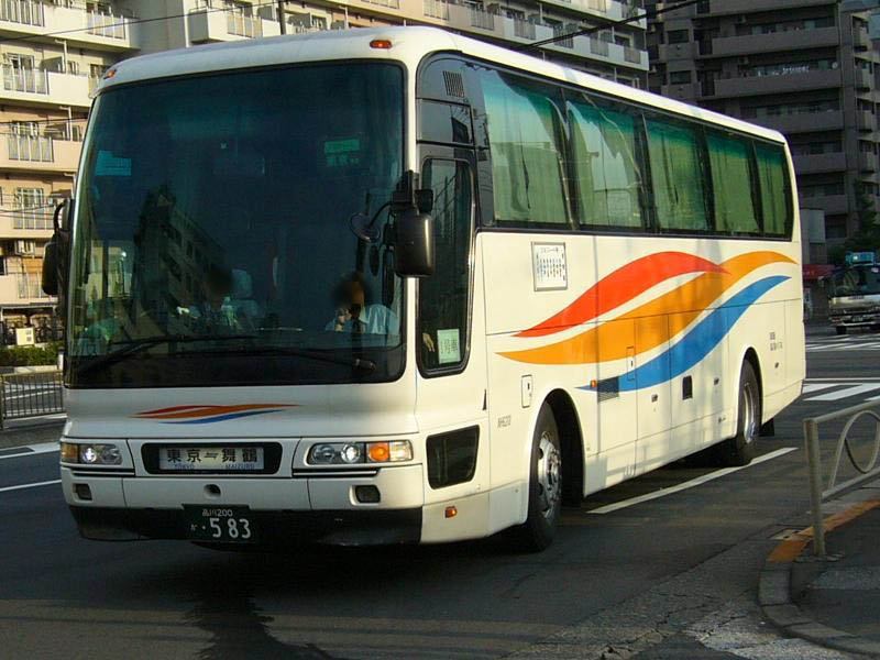 登録番号：品川200か・583 羽田京急バス東京営業所所属 car no.6201 高速用車両（各系統で共通運用） 三菱ふそう・エアロクィーン PJ-MS86JP